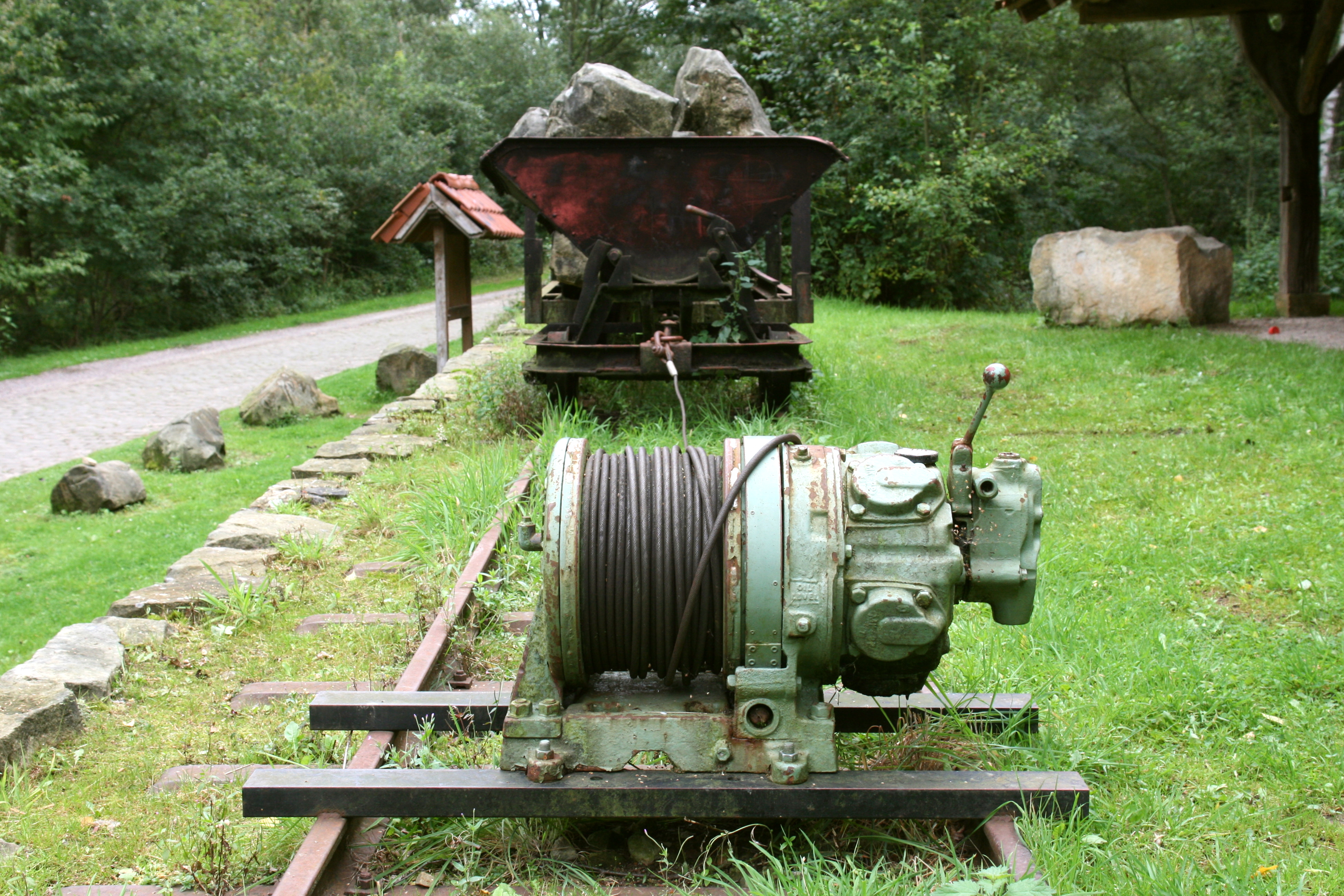 Ehemaliger Sandsteinbruch Bornhalmsche Kuhle, Romberg in Bad Bentheim